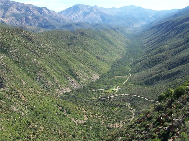 Gamkaskloof